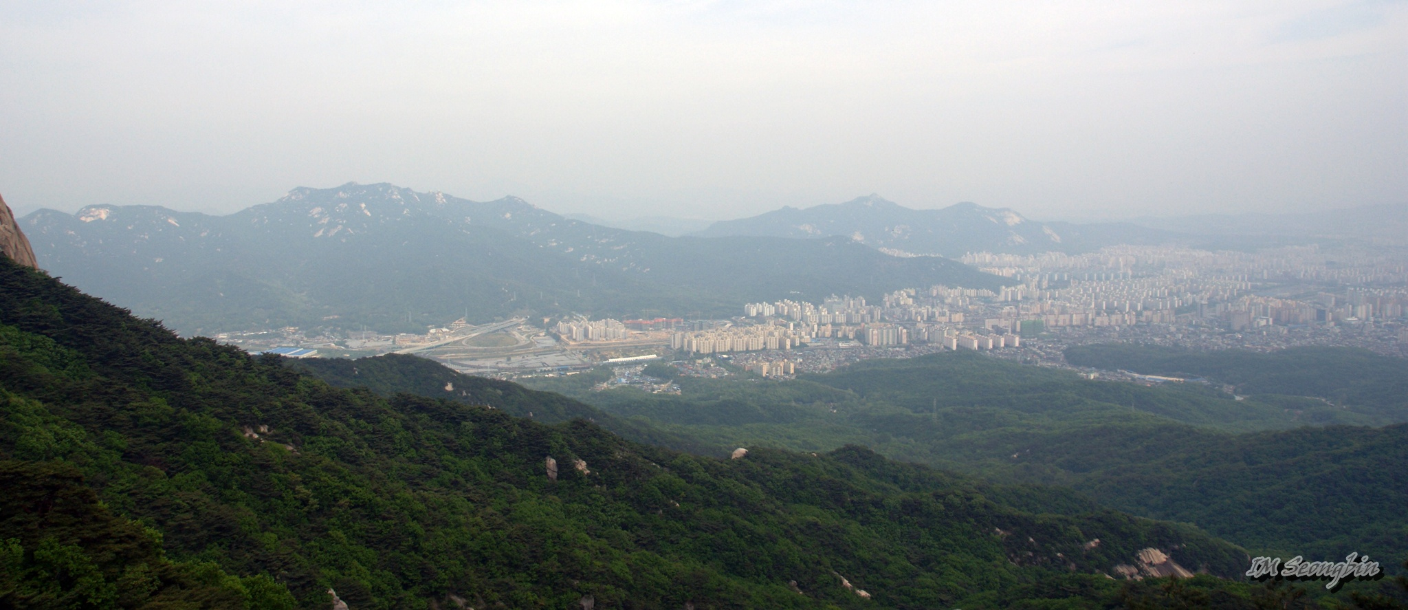 Dobongsan, Nowongu (도봉산에서 본 도봉구, 노원구)